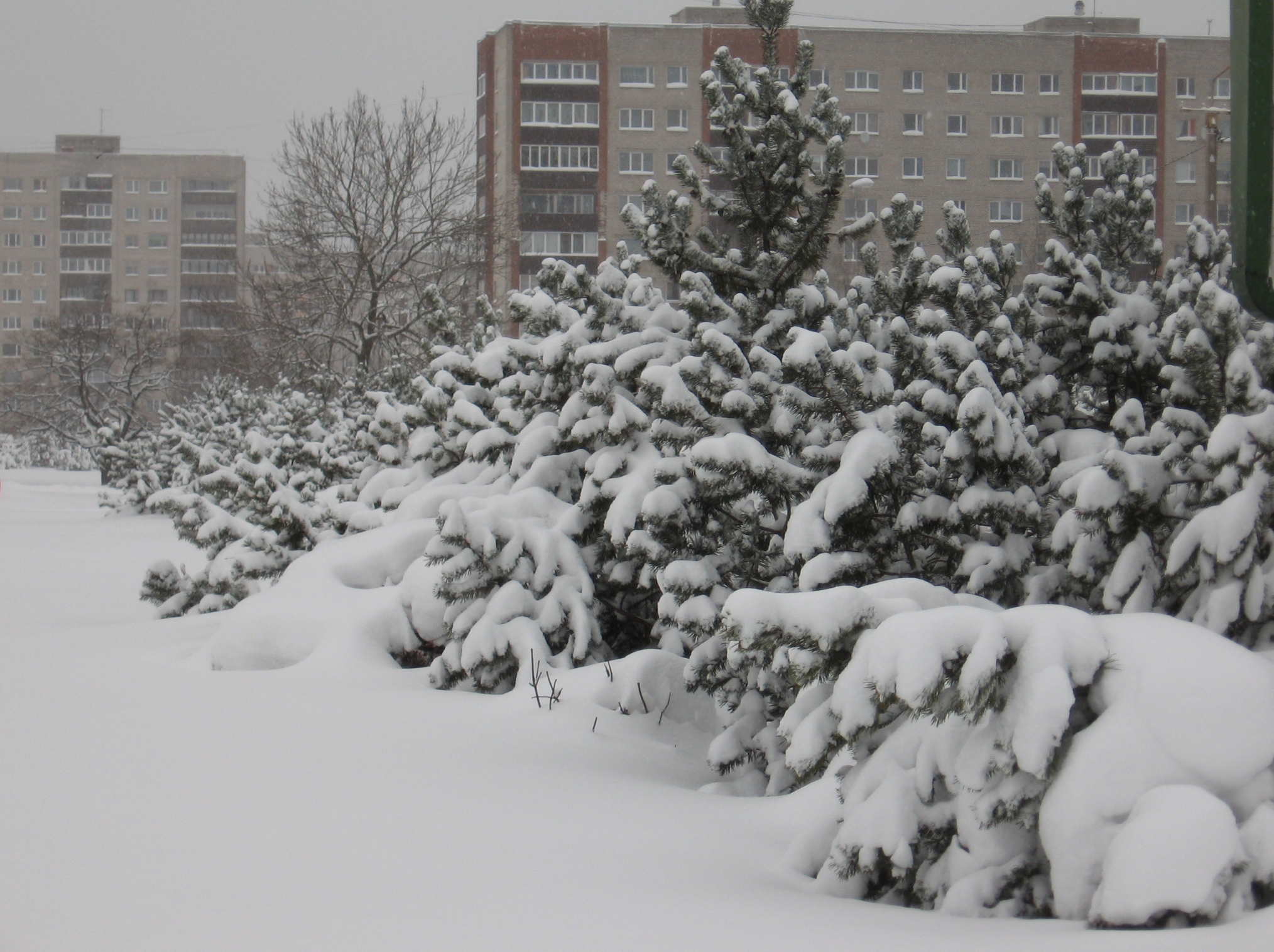 Monika lumetormi tagajärjed Narvas, Eesti